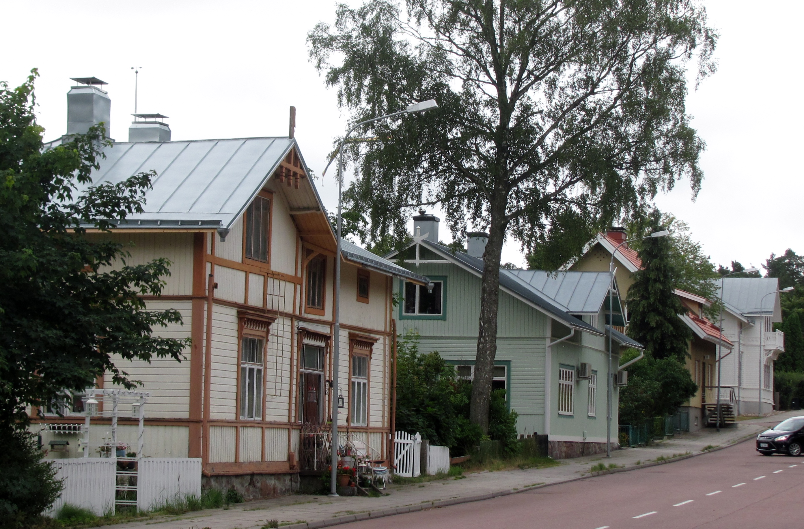 Södragatan, Mariehamn, Fasta Aland, Finnland